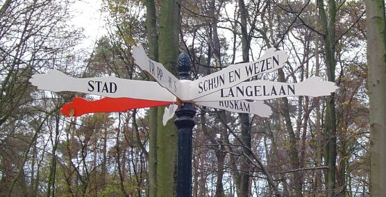 Handwijzer "De Zevensprong" in het Rijkenbargse bos te Ruurlo. Bord is geplaatst naar aanleiding van de televisieserie.